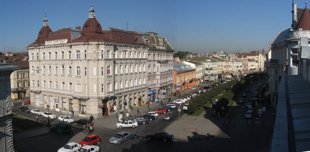 Проспект Шевченко во Львове. Вид со стороны улицы Саксаганского.